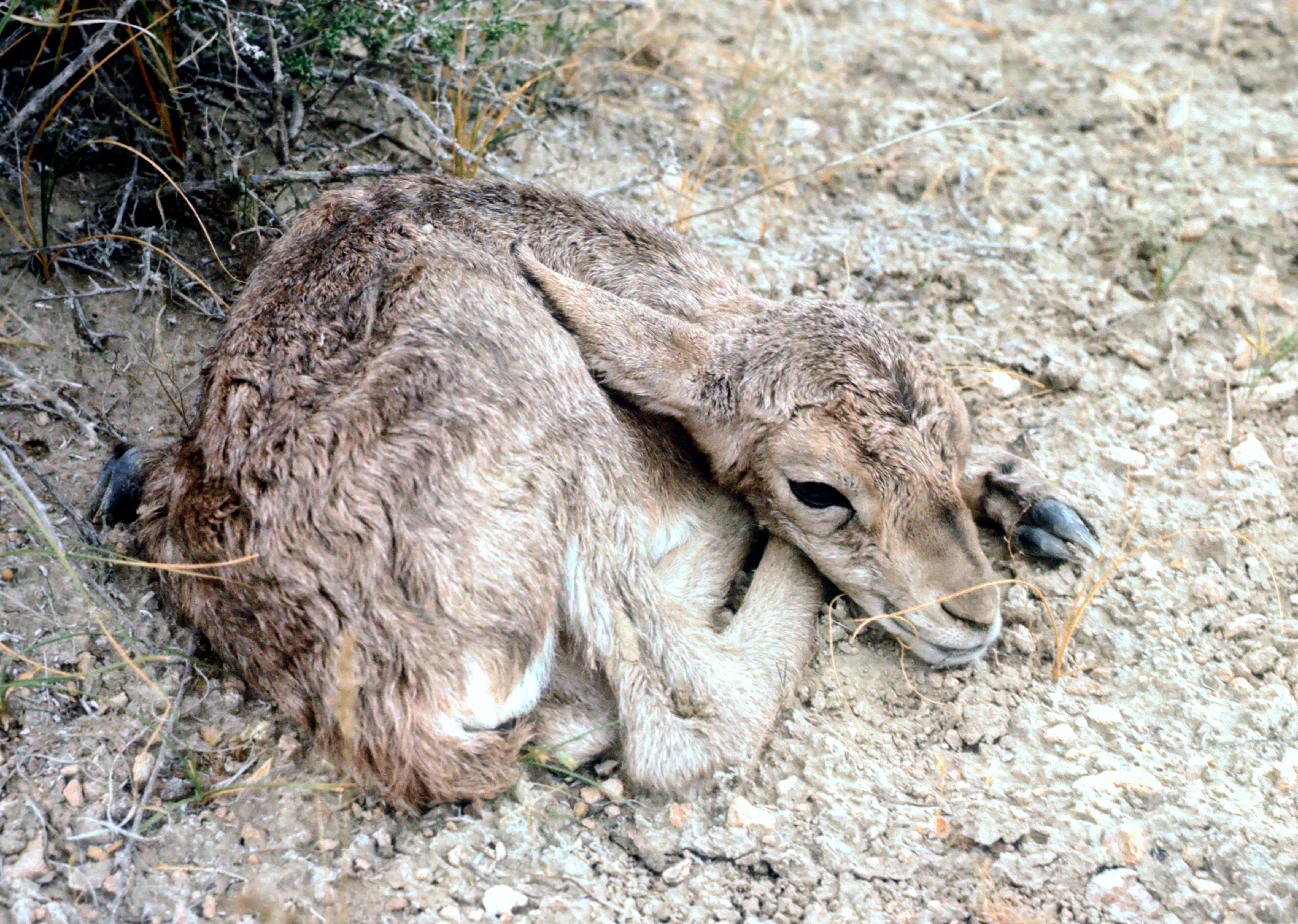 Новорожденный джейран в естественных условиях. Пустыня Кызыл-Кум